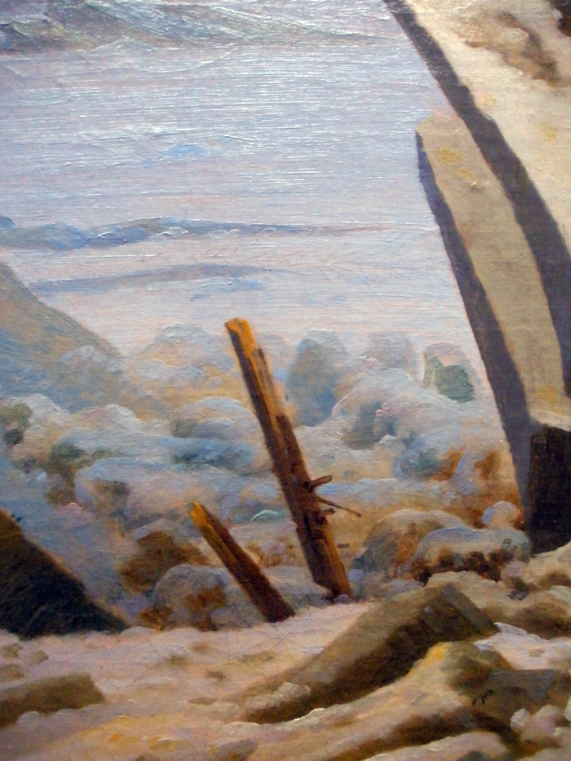 Detail aus Caspar David Friedrich Das Eismeer